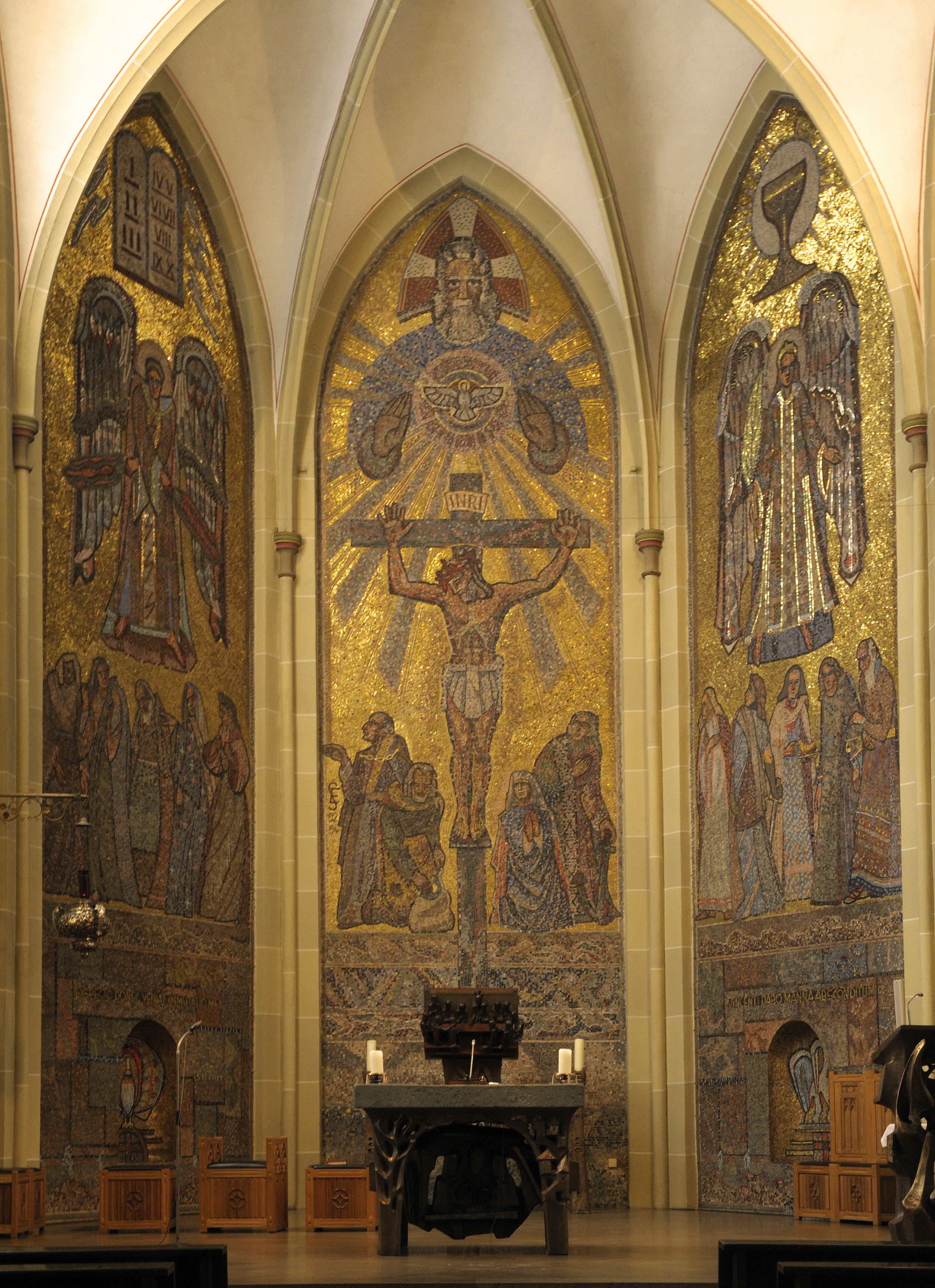 Edmund Schuitz: Entwurf und Ausführung Mosaik, 1952-1954